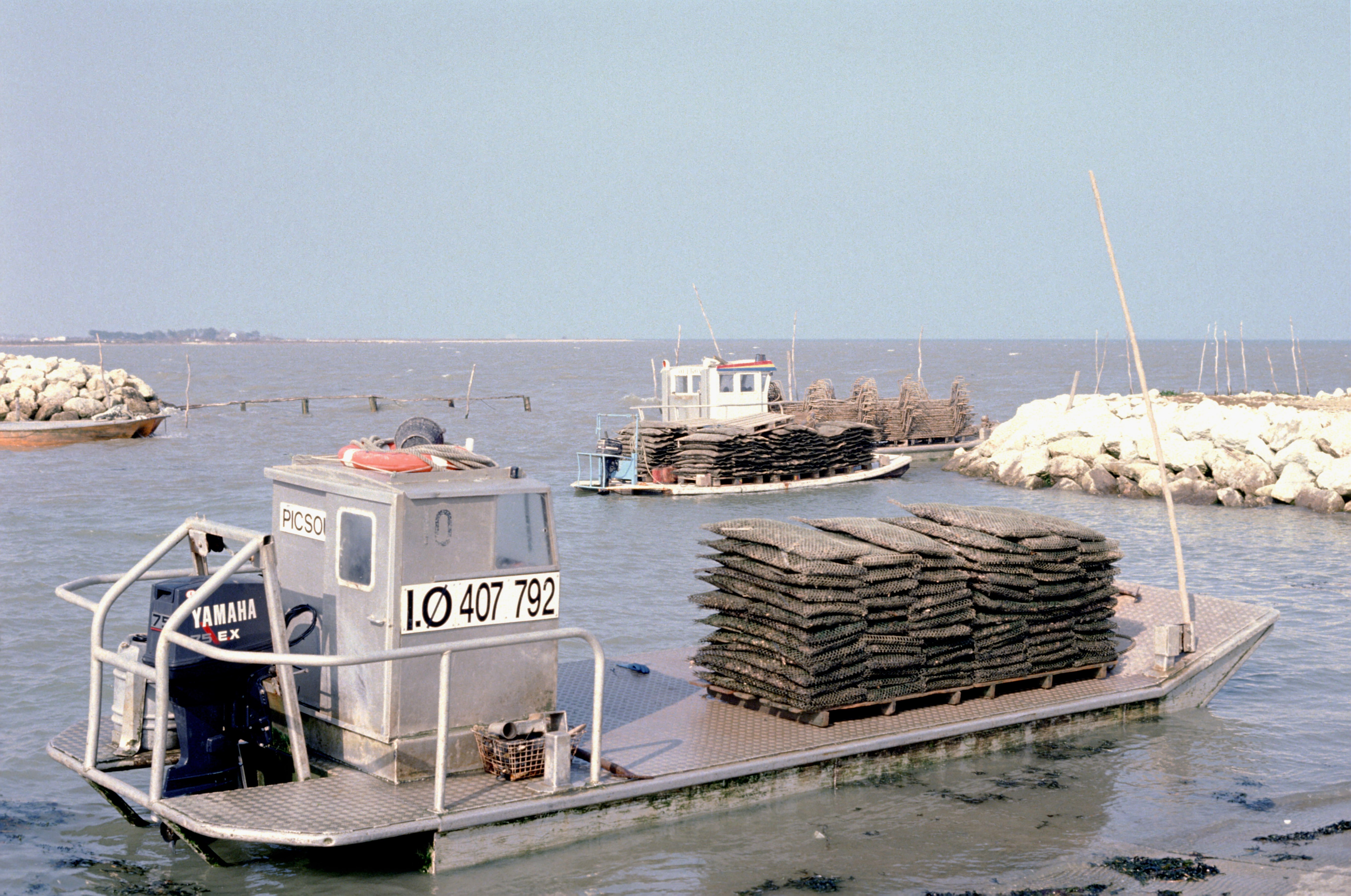 Un chaland (ou plate) ostréicole, sur une cale de mise à l'eau, chargé de poches à huitres pleines. Bassin ostréicole de Marennes-Oléron, Île d' Oléron, La Baudissière (Route des Huitres), Charente Maritime, France.